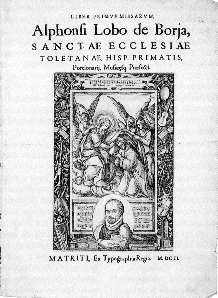 Lobo. Liber primus missarum (title page).